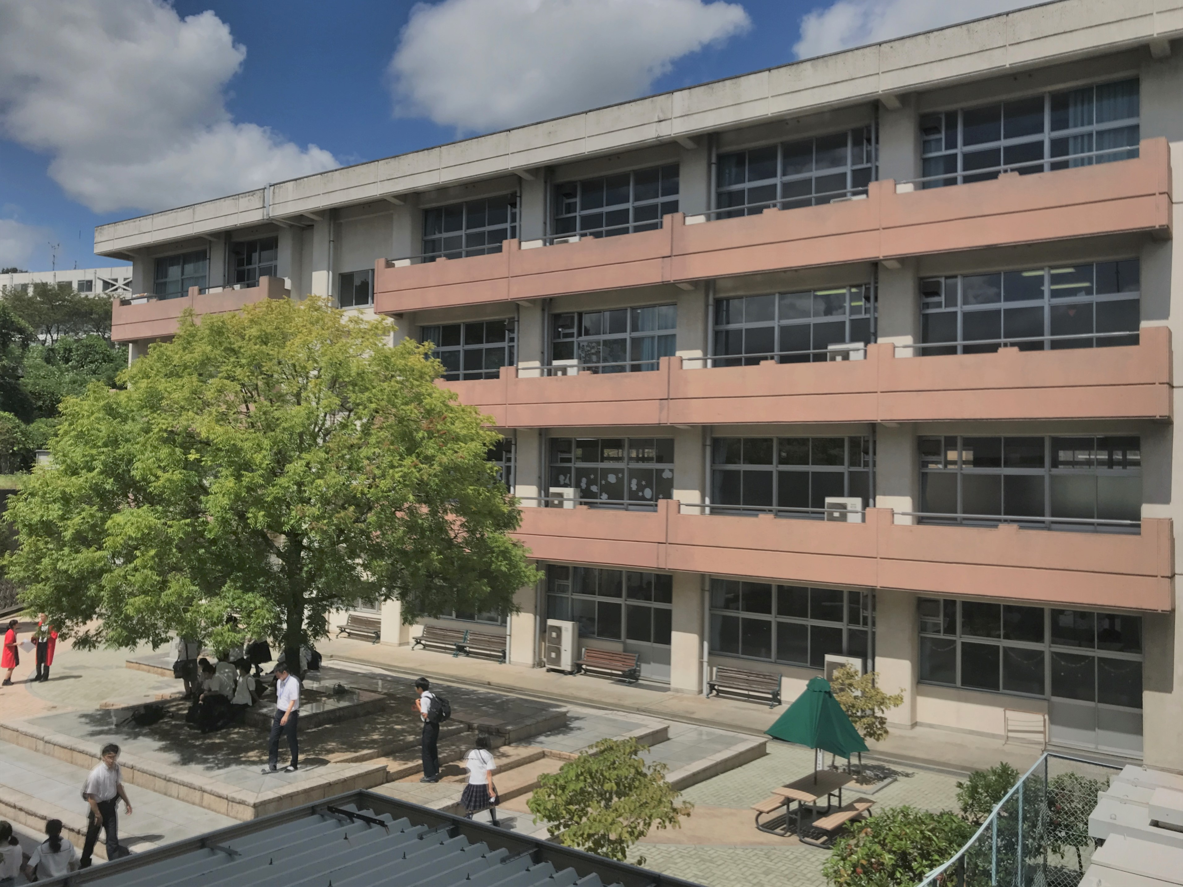 岡山県にある私立中高一貫教育校の岡山中学高等学校の校舎。当日はちょうど学園祭。